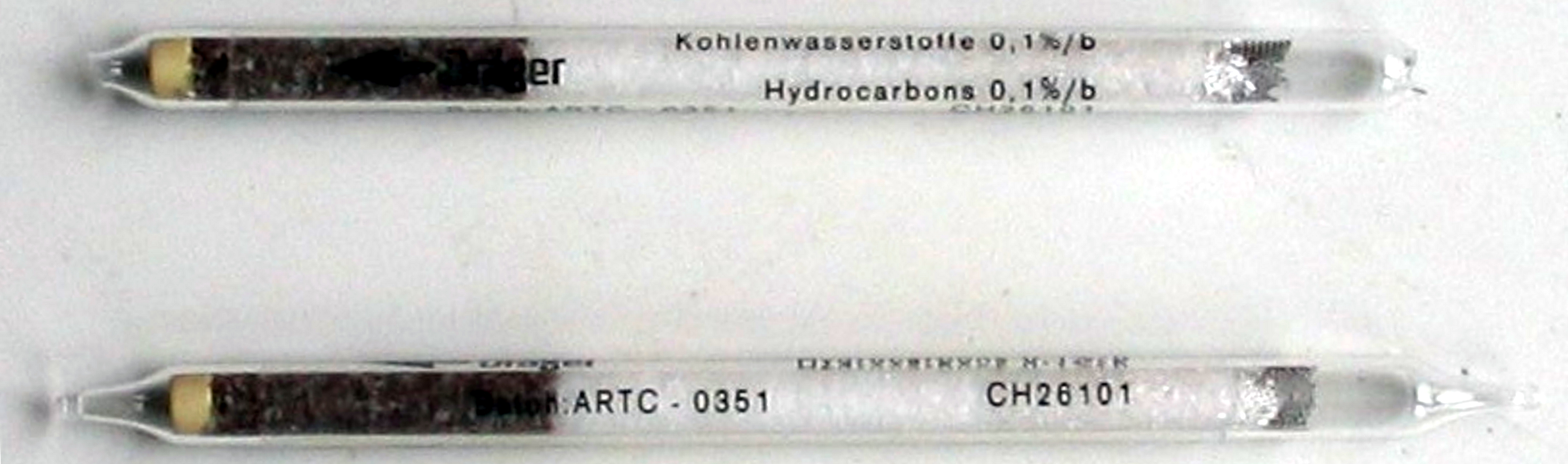 Kohlenwasserstoffkurzzeitprüfröhrchen